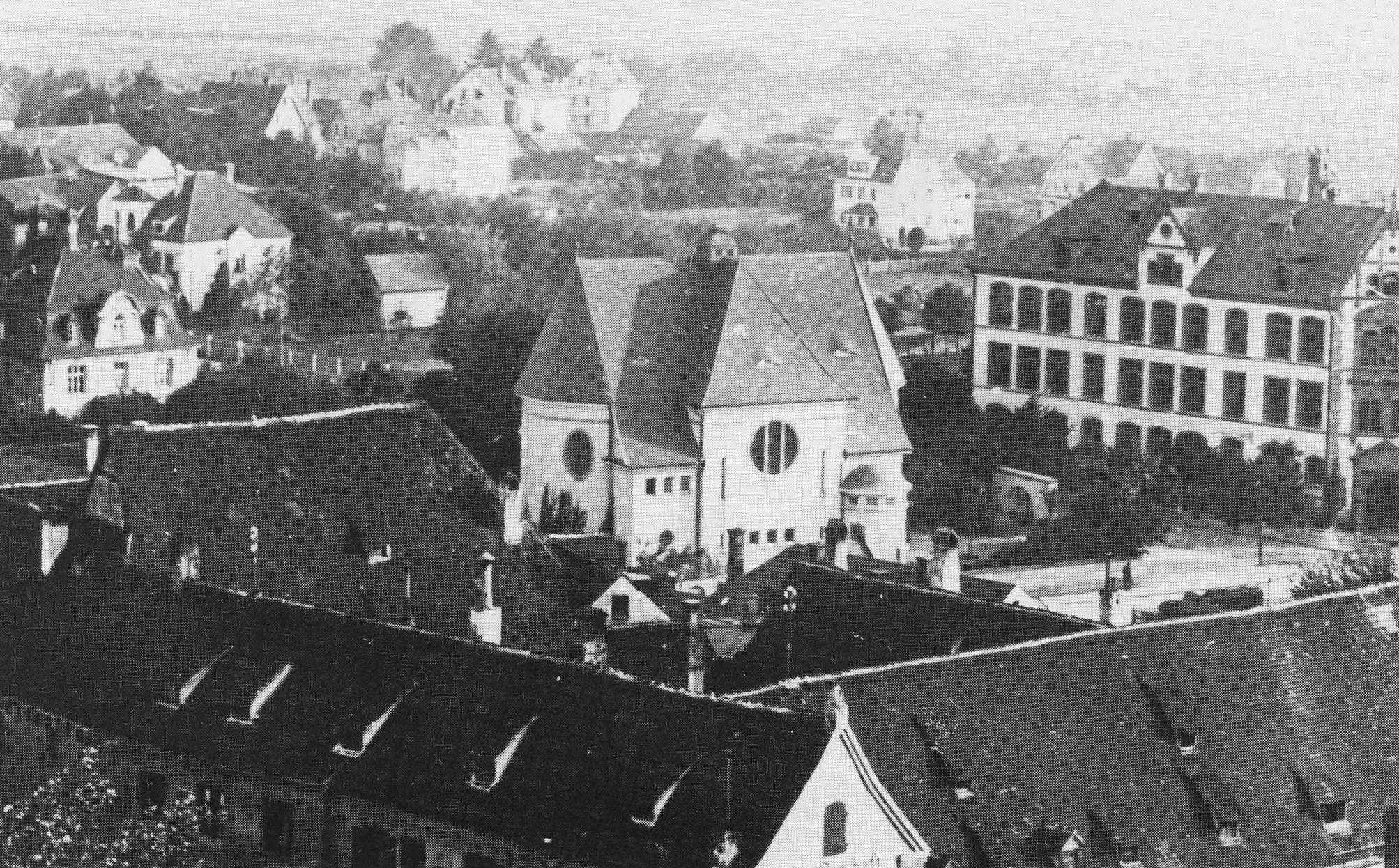 Die ehemalige Synagoge im oberschwäbischen Memmingen